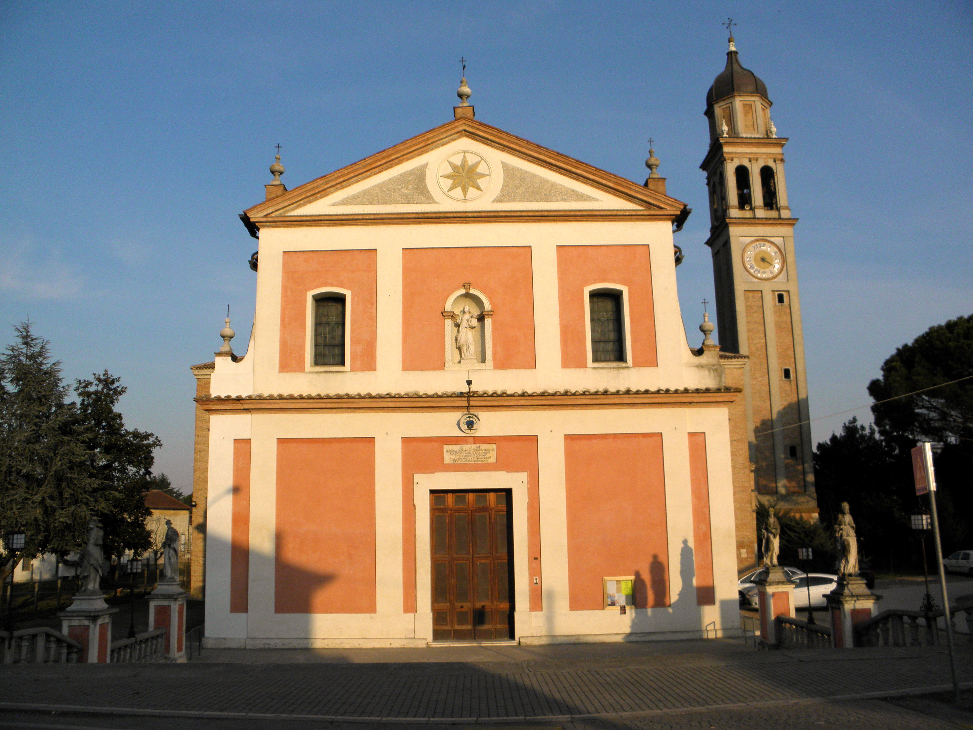 Polesella: la chiesa parrocchiale della Beata Vergine del Rosario.